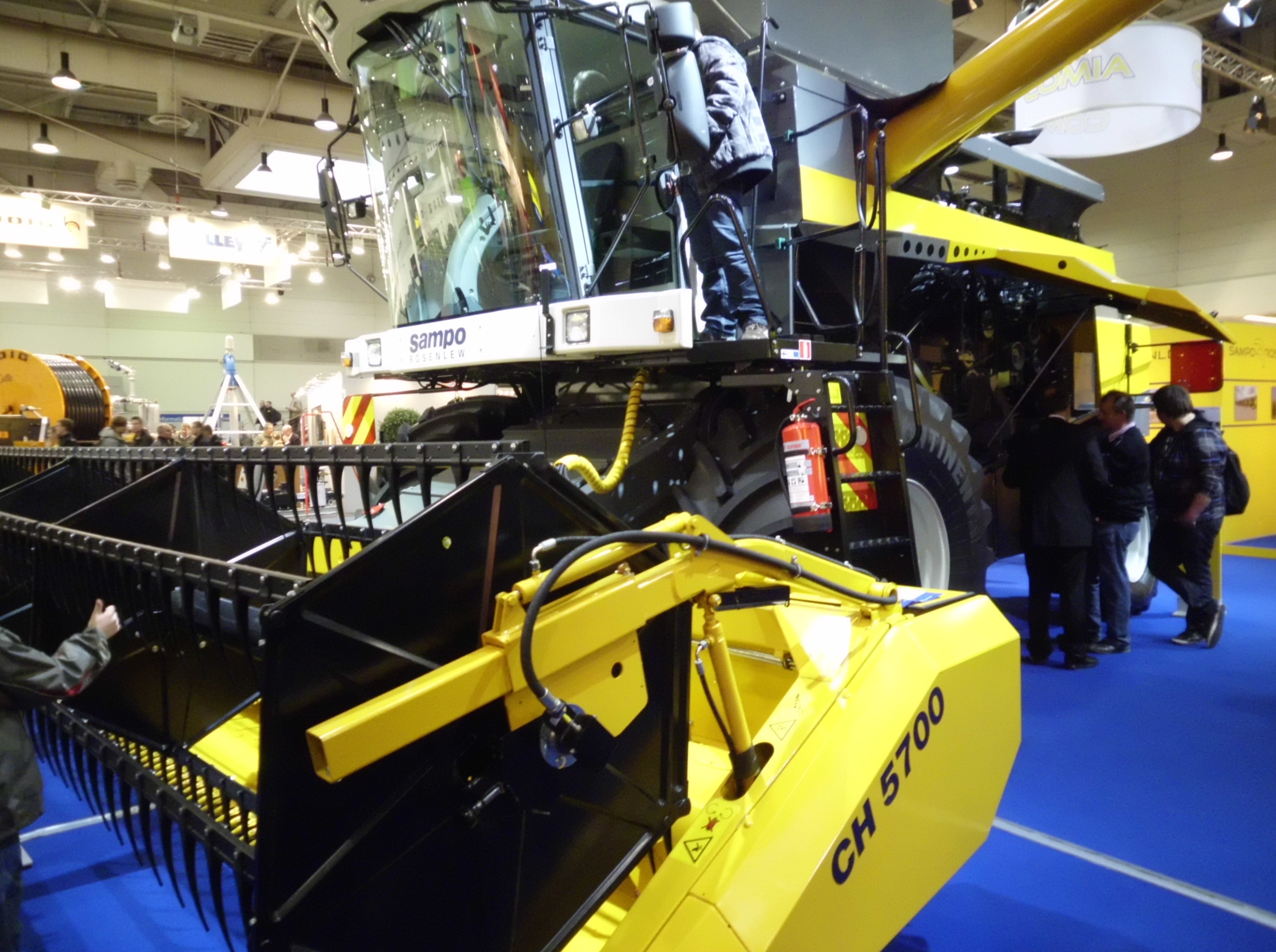 Der Sampo Rosenlew 3085 Superior auf der Agritechnica 2011